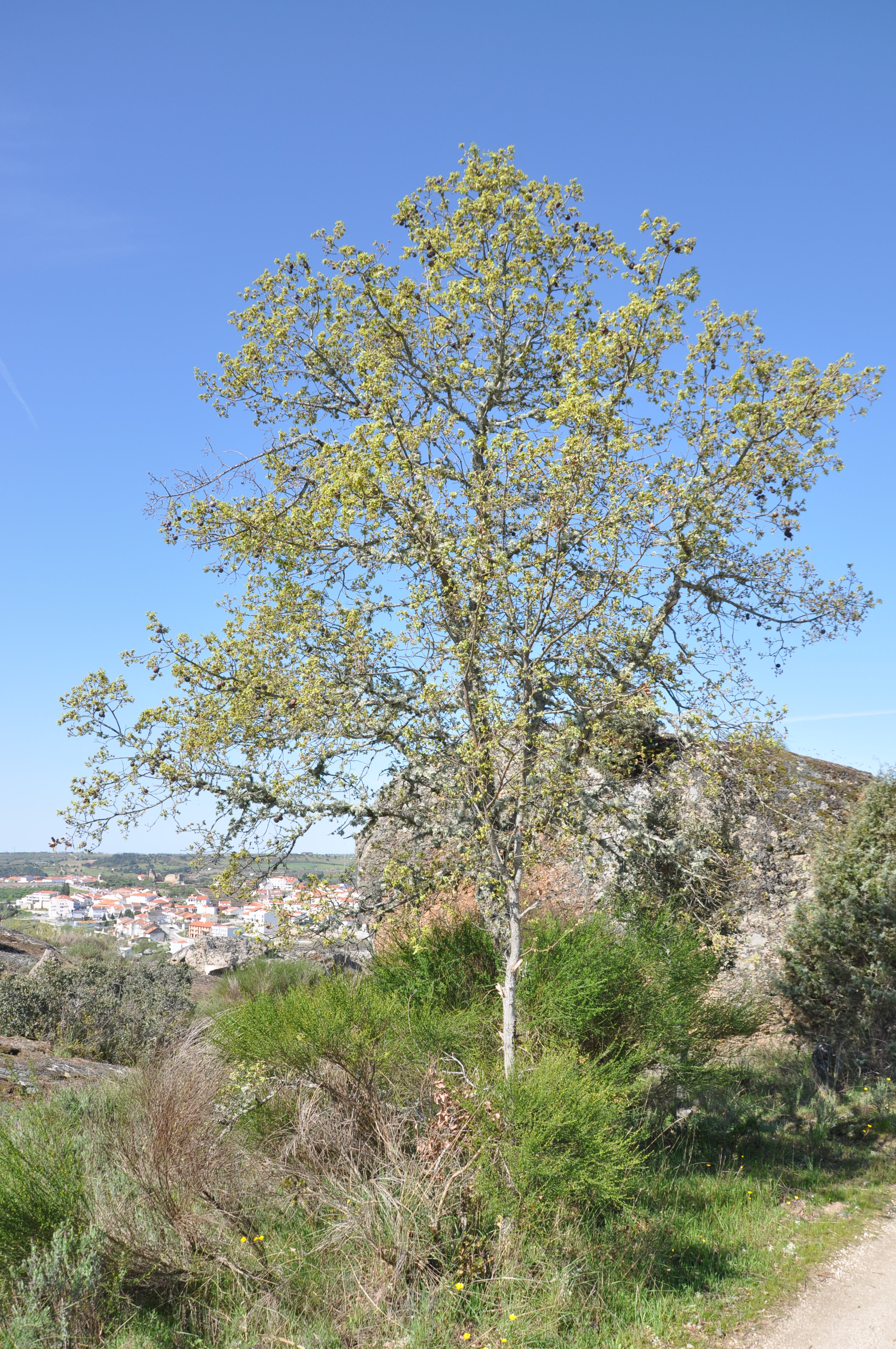 Cerquinho (Quercus faginea). Miranda do Douro, Portugal.